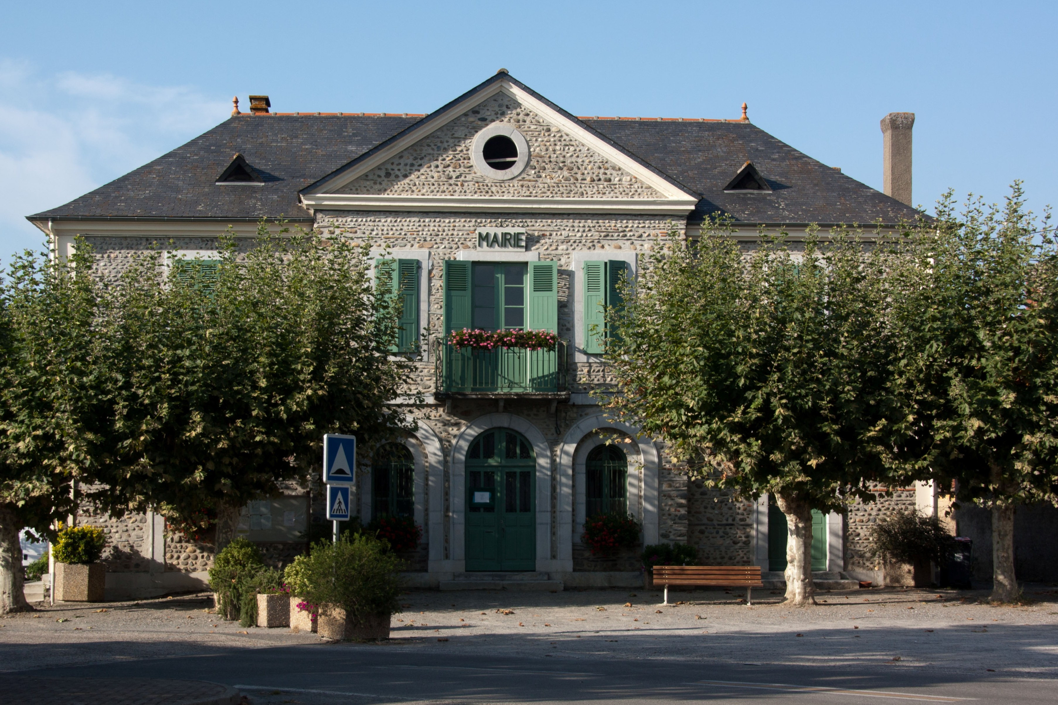 Mairie d'Oursbelille / Oursbelille / Hautes-Pyrénées / France